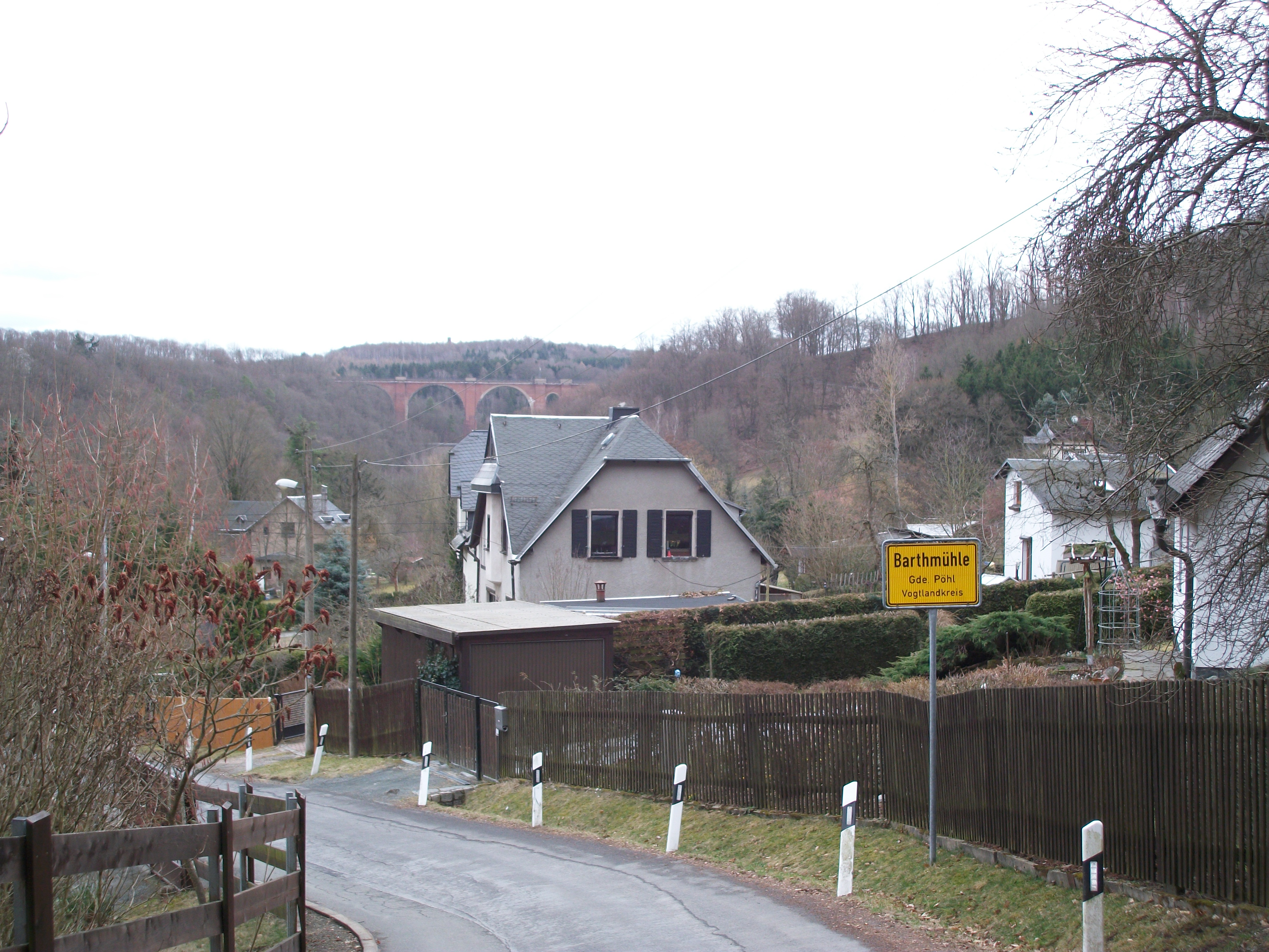 Barthmühle, Ortsteingang mit Elstertalbrücke